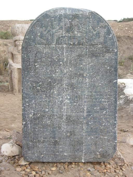 من آثار بوتو، دسوق